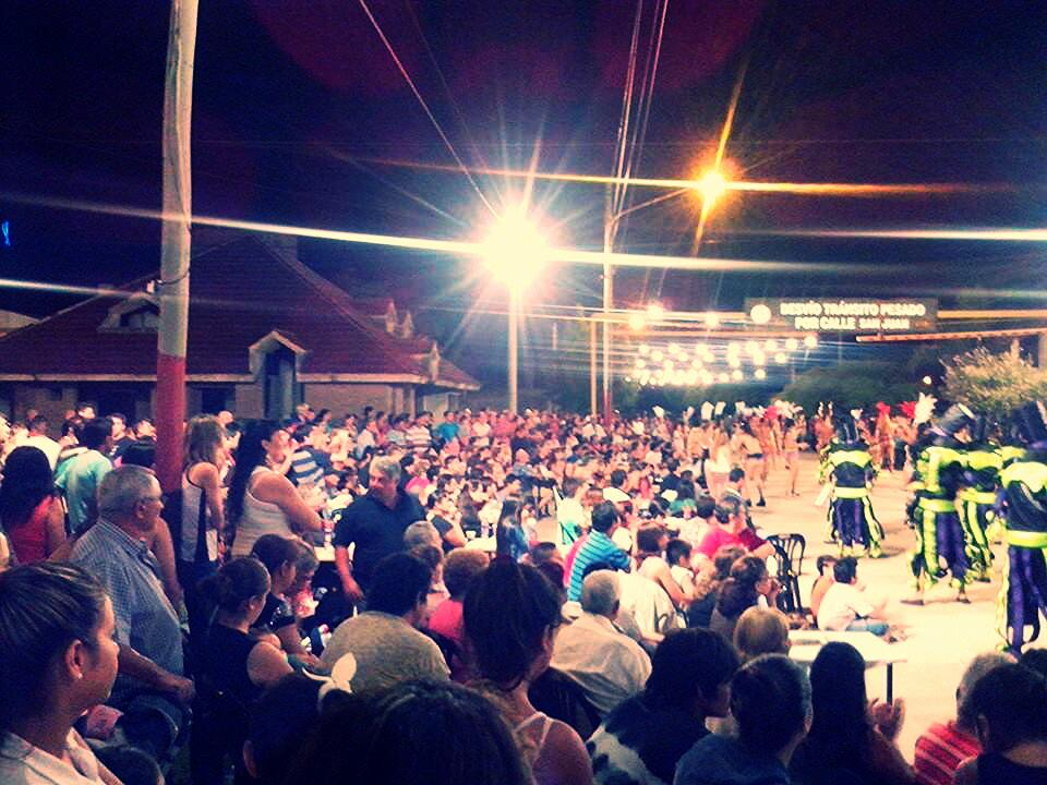 Bailando en la calle